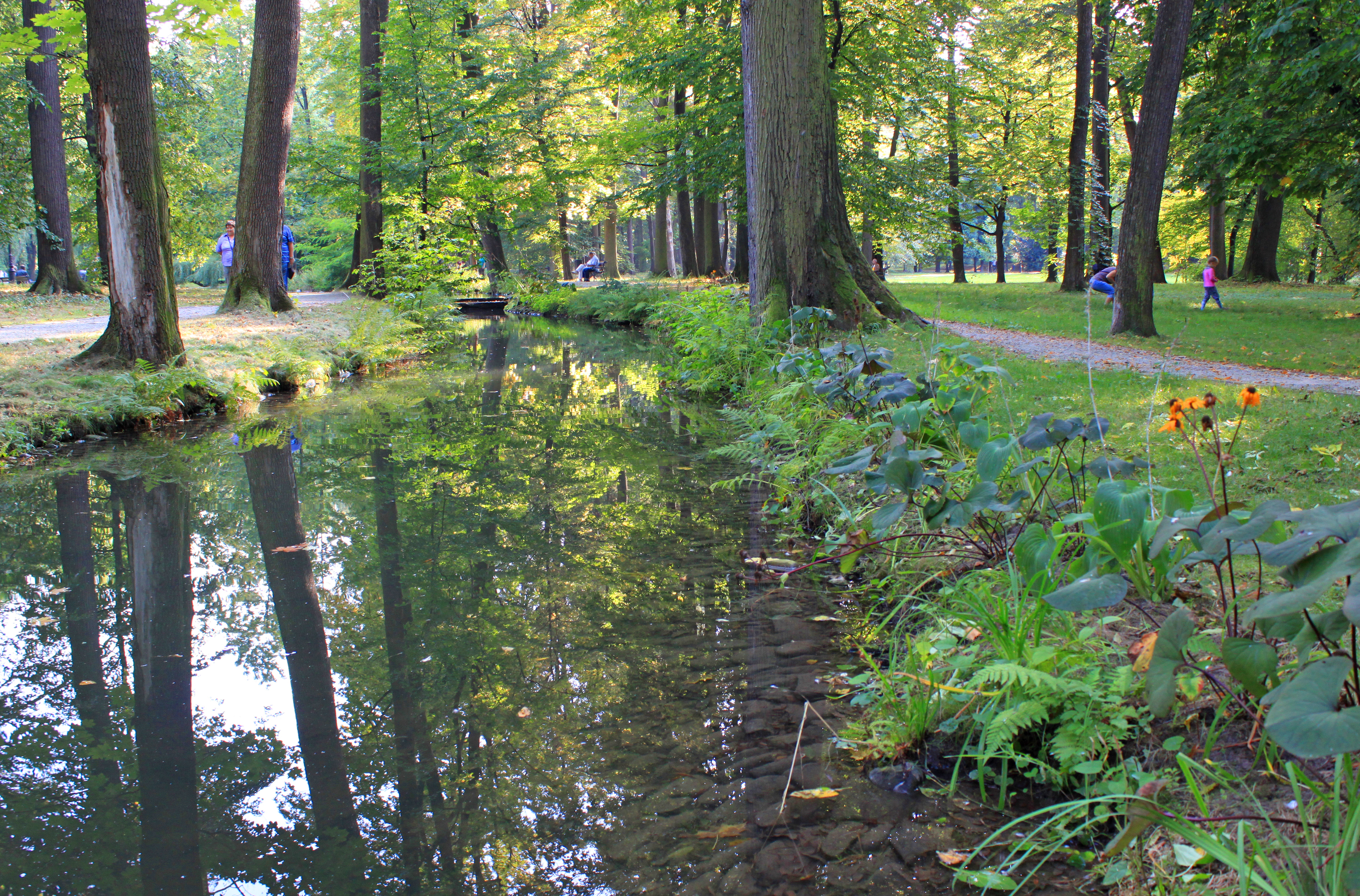 Żywiec, park, 1712, XIX (w zespole zamkowym)